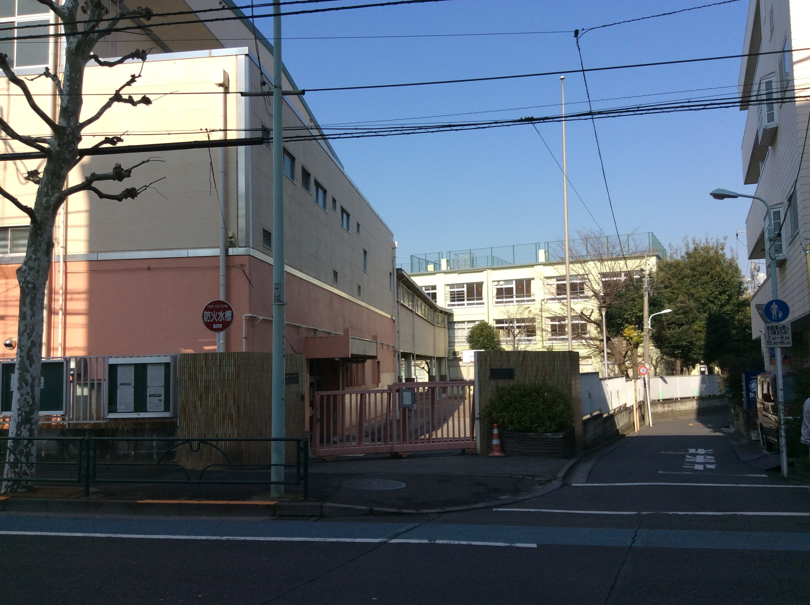 （2014年12月撮影）